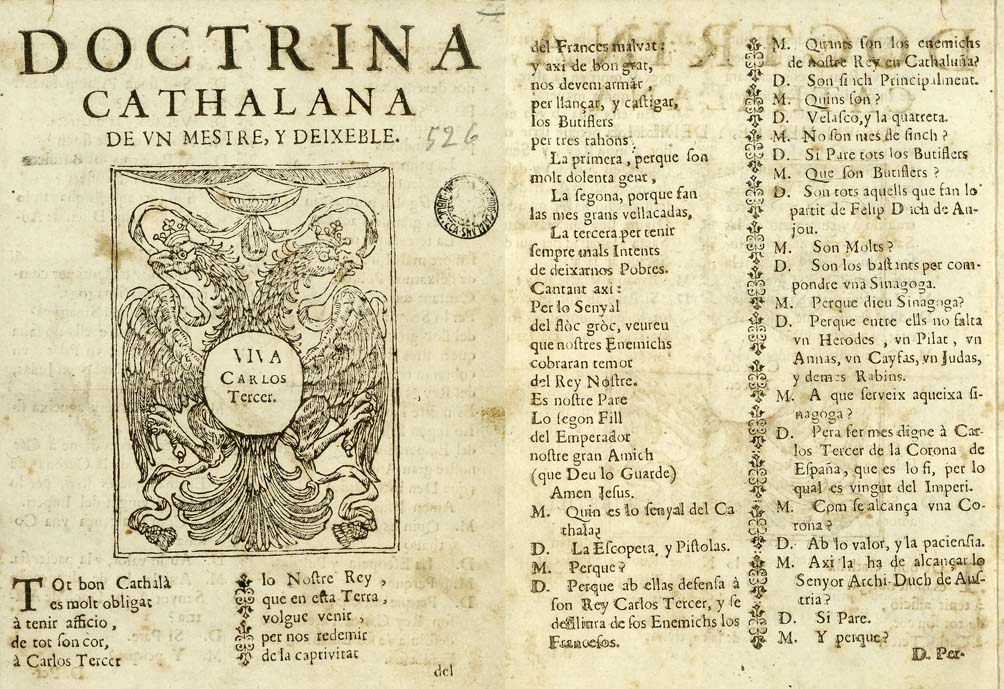 Propaganda austracista: «Doctrina cathalana de un maestro y discípulo» que atacaba al virrey Velasco y su «quarteta» de butifleros: los jueces de la Real Audiencia de Cataluña José Pastor y Mora, Francisco Rius y Bruniquer, José Güell, Francisco Portell.